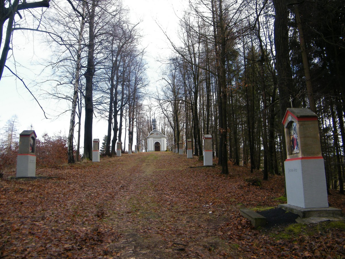 Křížová cesta v Brtníkách, celkový pohled